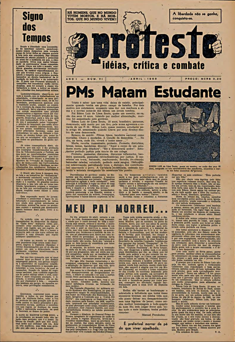 Jornal anarquista brasileiro que circulou entre 1967 e 1968.